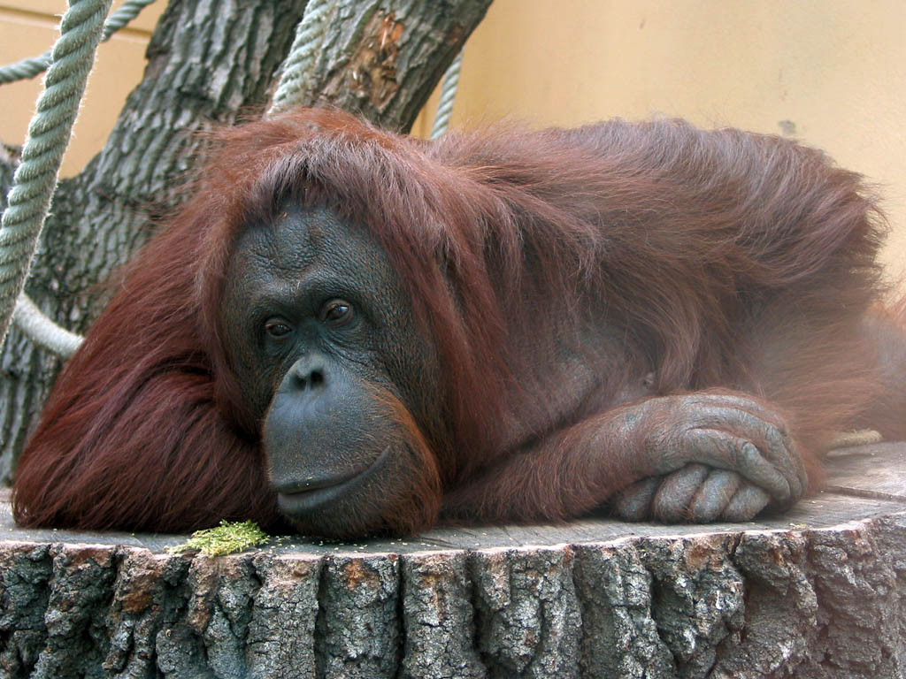 Orang Utan „Nonja“, Schloß Schönbrunn Zoo, Vienna, Austria